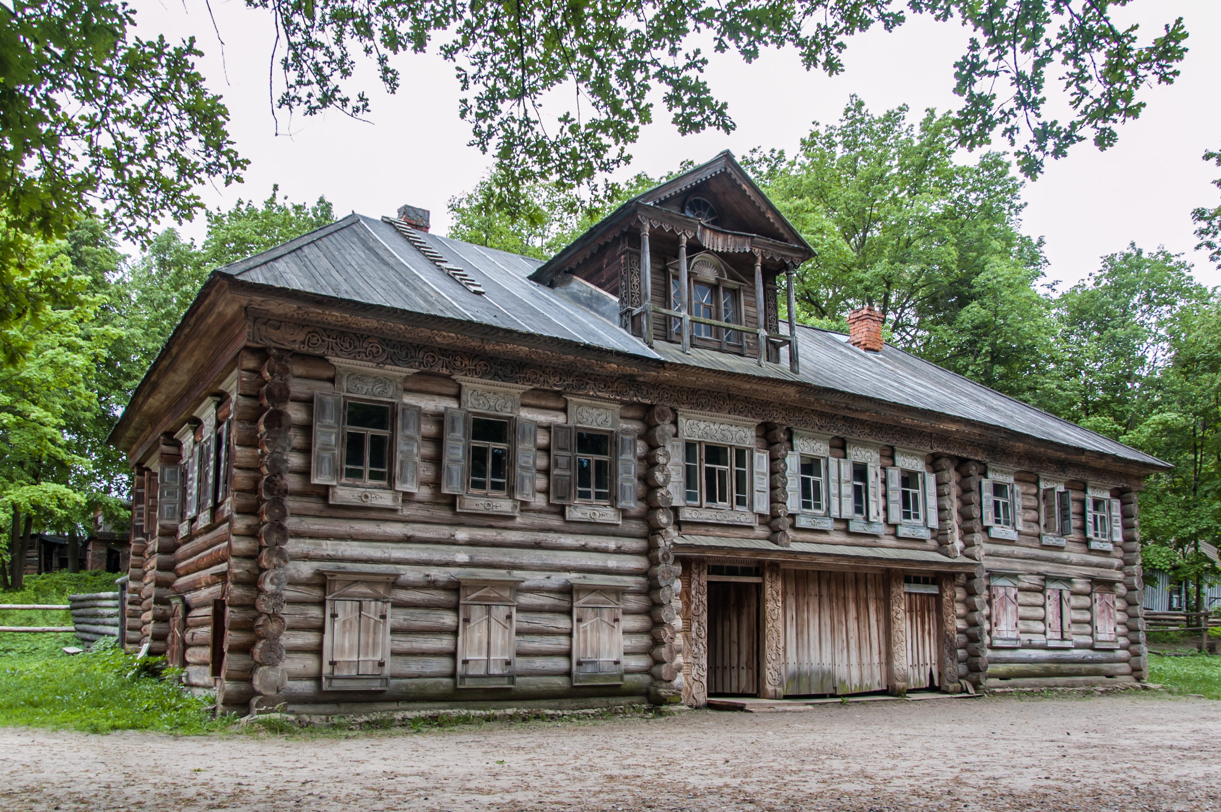 Жилой дом Павловой: улица Горбатовская, 41, Нижний Новгород, Нижегородская область